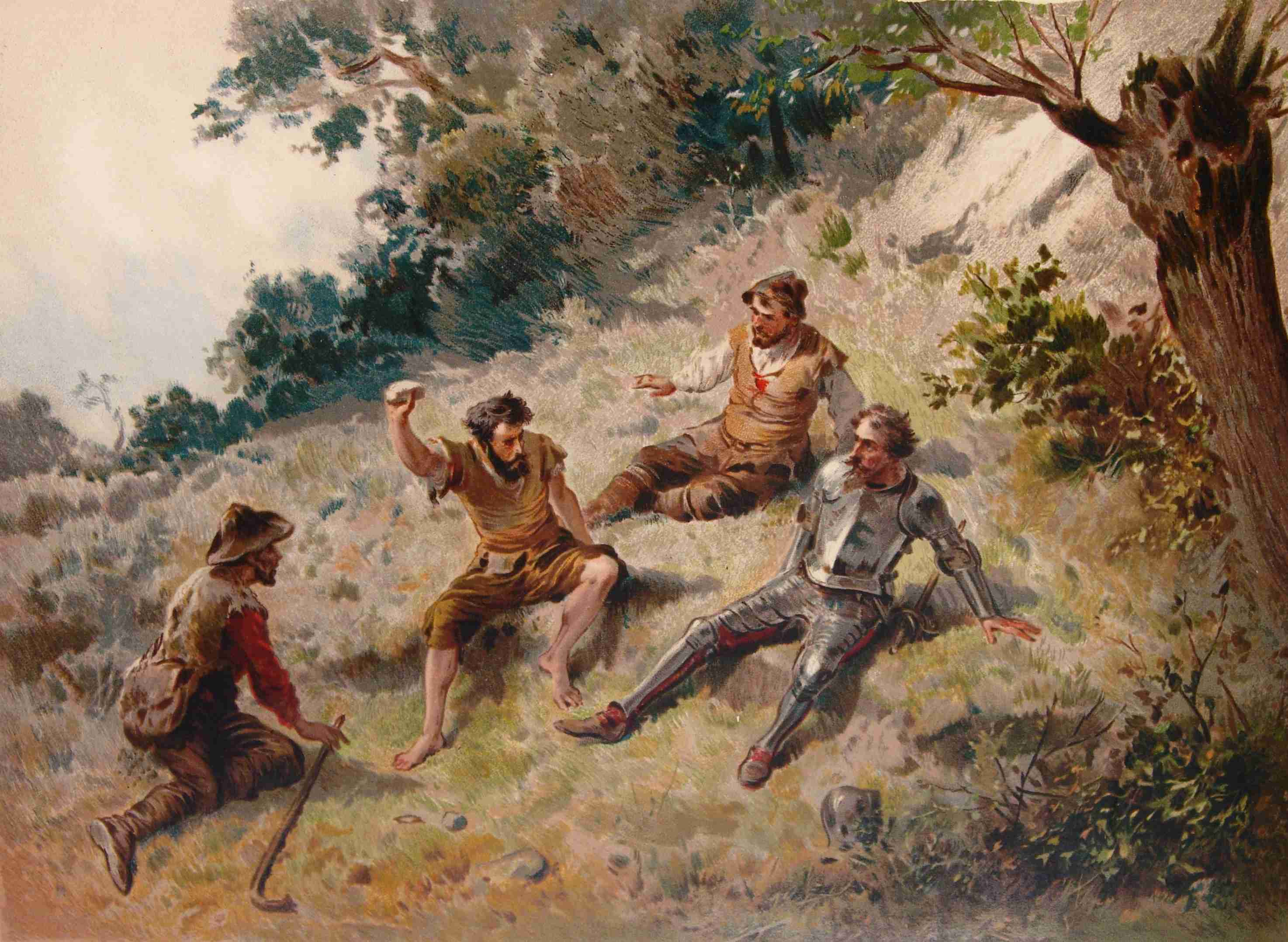 202_063_quijote_cap24